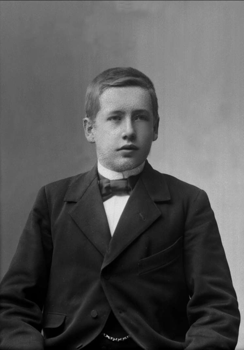 Arkitekten Trygve Klingenberg som svært ung. Foto: Gustav Borgen/Norsk Folkemuseum.